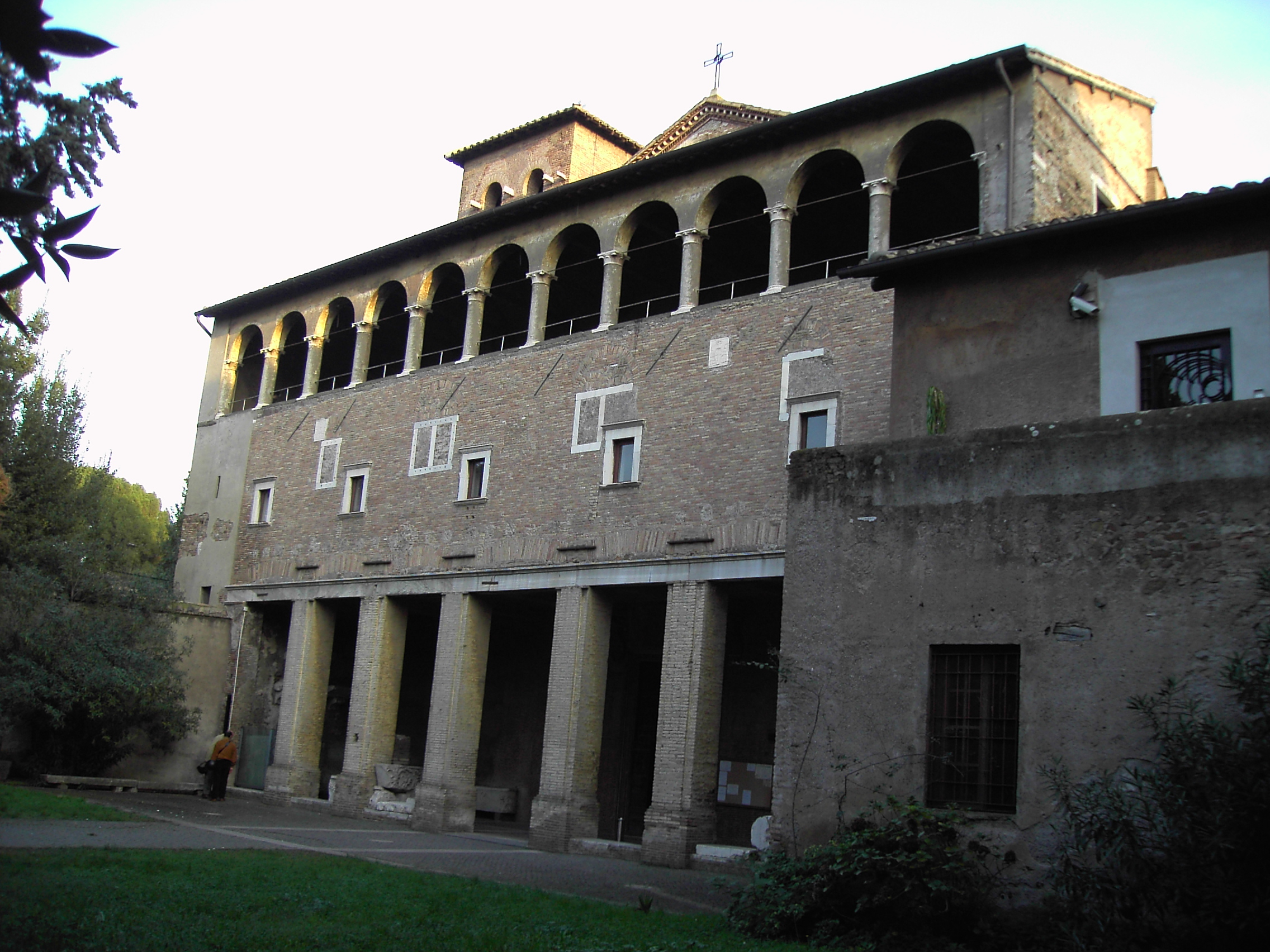 Roma, Chiesa di San Saba, Facciata